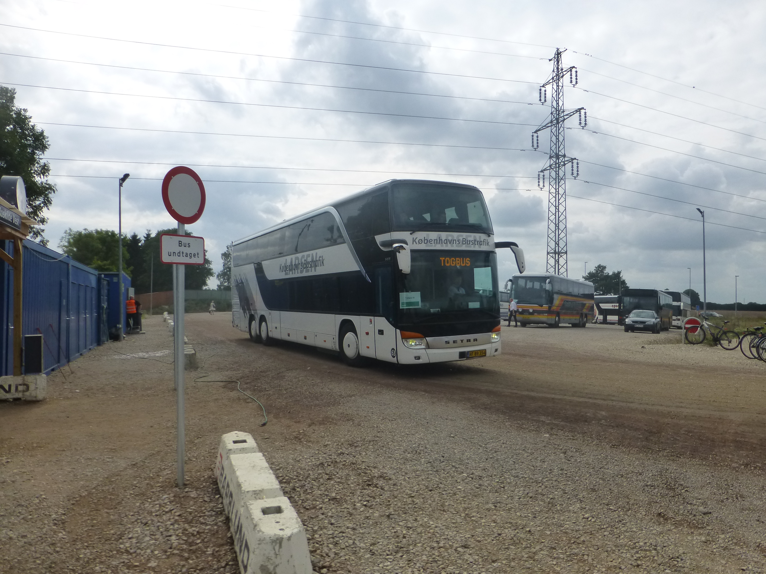 The temporary Roskilde Vest Station on Nordvestbanen between Roskilde and Kalundborg in Denmark. Replacement bus for Tølløse.